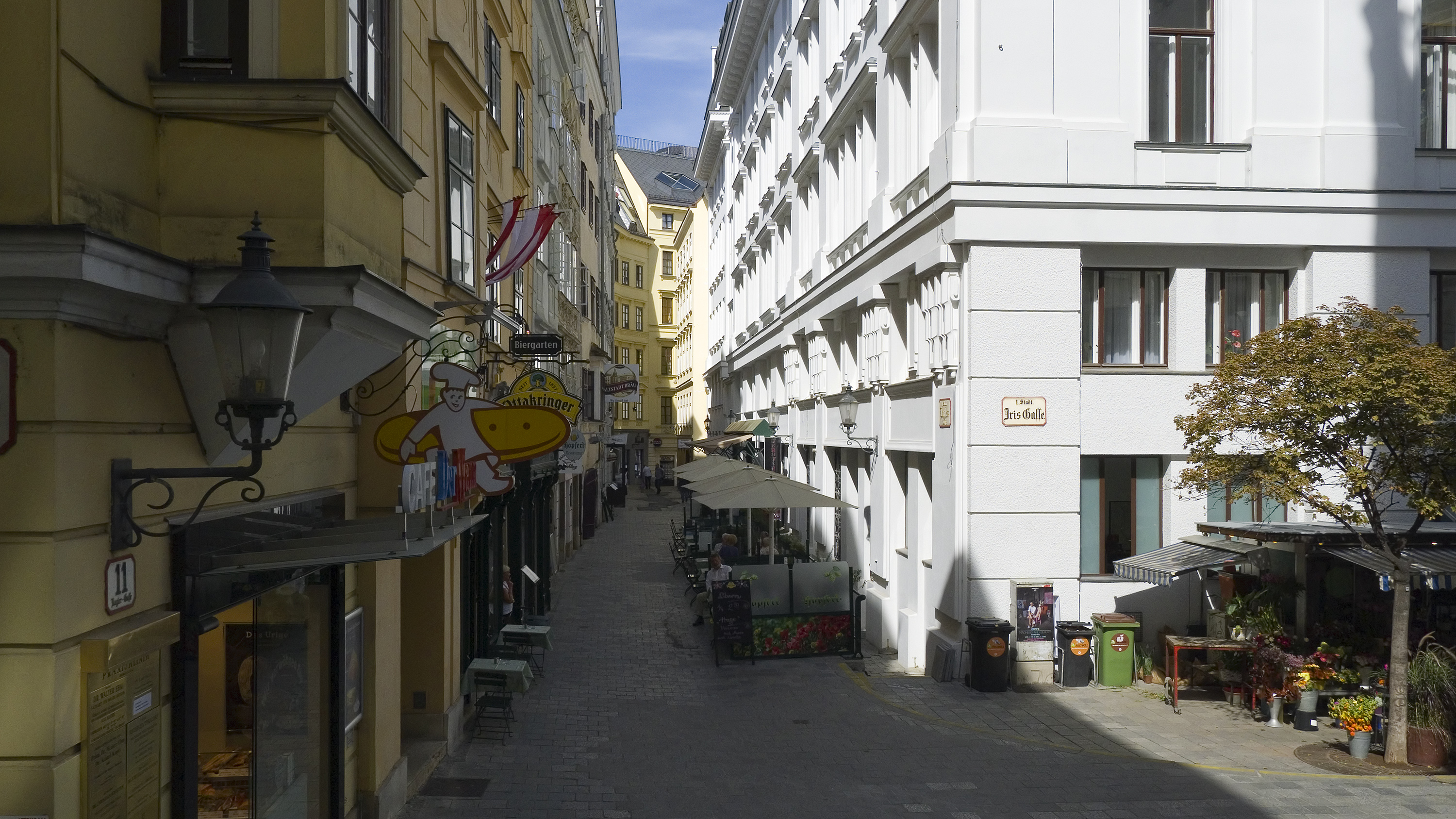 Naglergasse in Wien 1 beim Haarhof Richtung Nordwesten